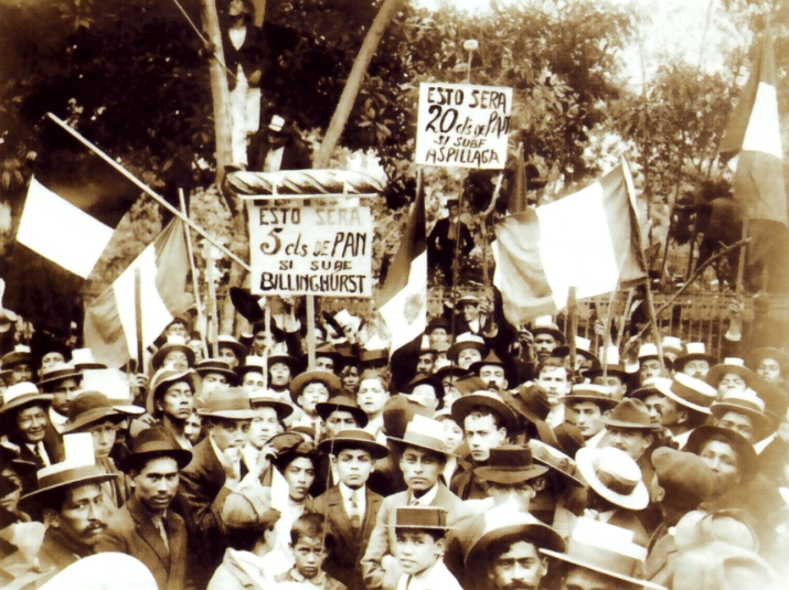 Manifestación popular en favor de Guillermo Billinghurst, candidato a la presidencia del Perú. Alameda de los Descalzos, Lima, 1912. Los cartelones aluden a la promesa demagógica de rebajar el costo de los alimentos, lo que le valió a Billinghurst el apelativo de "Pan Grande".